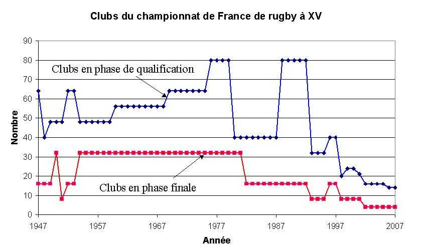 Taula amb els equips participants.